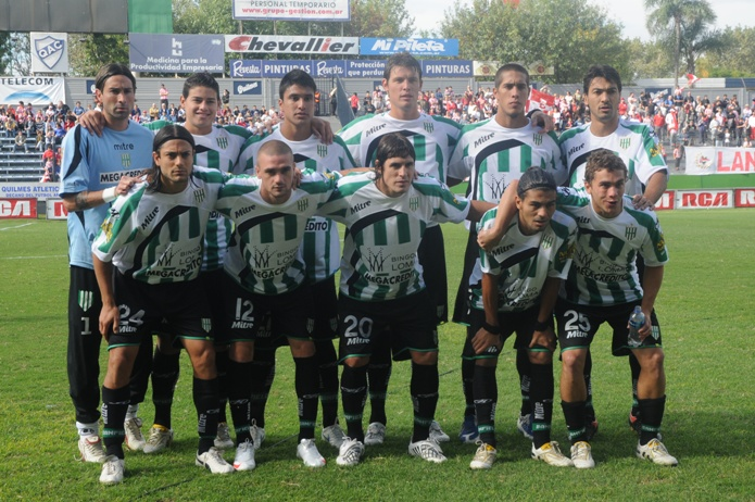 Una formación de Banfield en 2010, durante el Torneo Clausura de Primera División de Argentina.